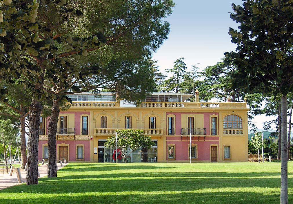 Fundació URV. Centre de Formació Permanent